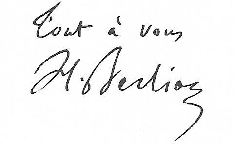 Autograph Berlioz